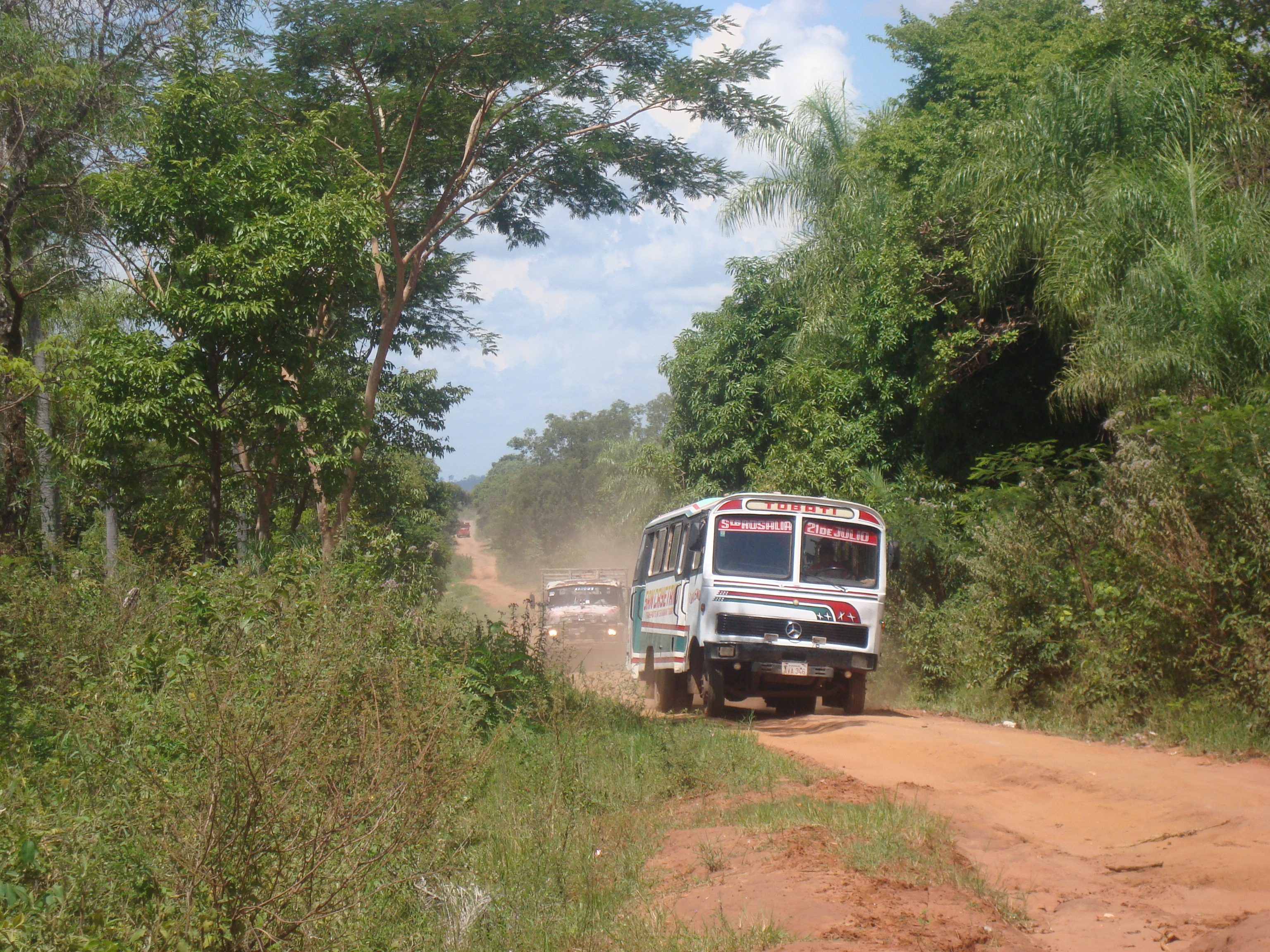 Un servicio de transporte público une la compañías 21 de Julio y Santa Rosalía con el centro urbano de Tobatí (Paraguay).